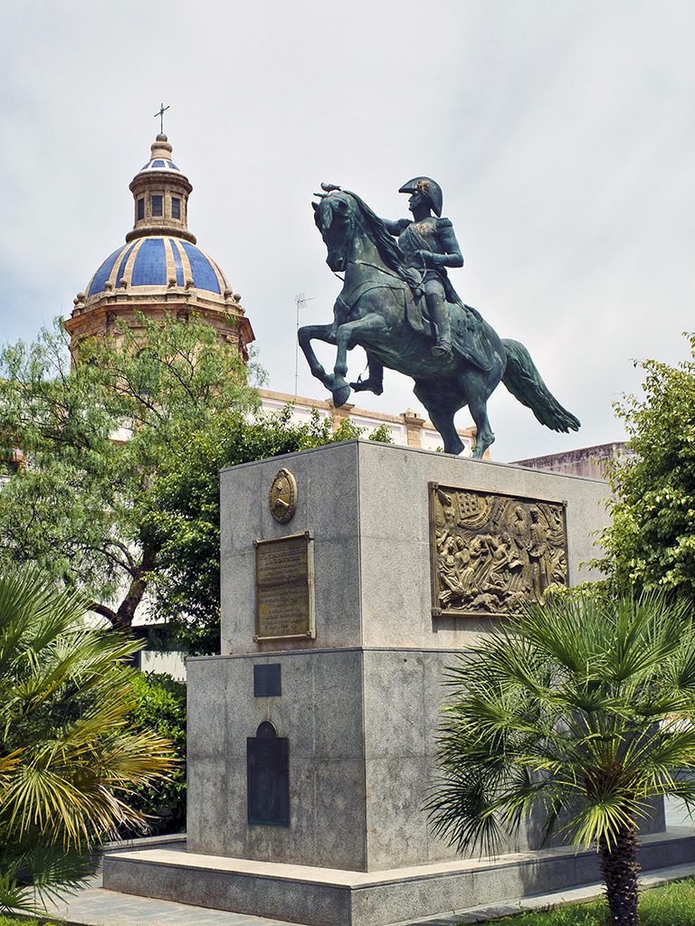 Estatua del General San Martín en la ciudad de Cádiz (Andalucía; España). La estatua fue inaugurada en 1975 y es una réplica en bronce del monumento que se encuentra en la plaza San Martín, de Buenos Aires (Argentina).